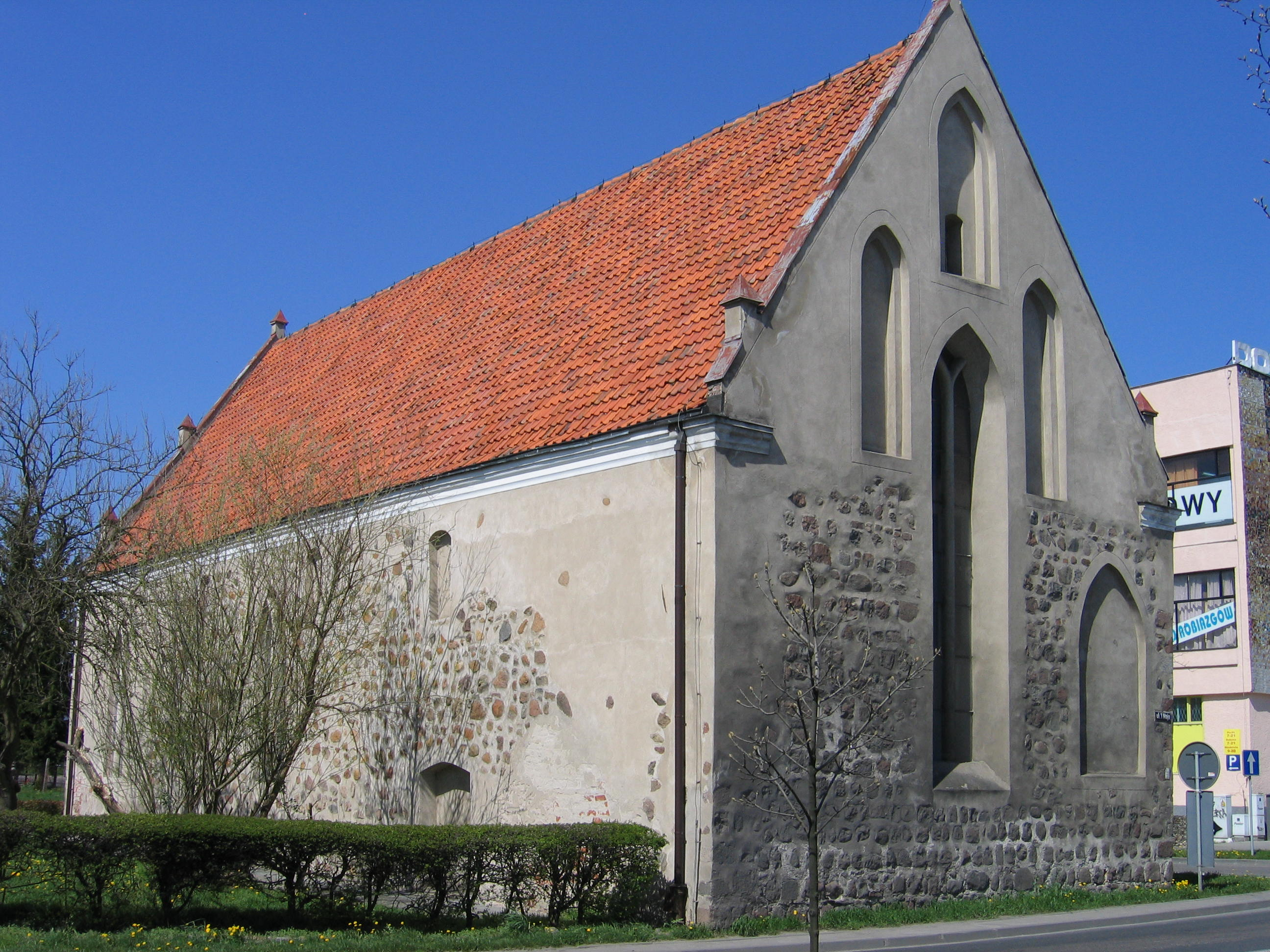 Pyrzyce, ul. Zabytkowa 84 - dawna kaplica szpitalna p.w. Świętego Ducha, obecnie biblioteka